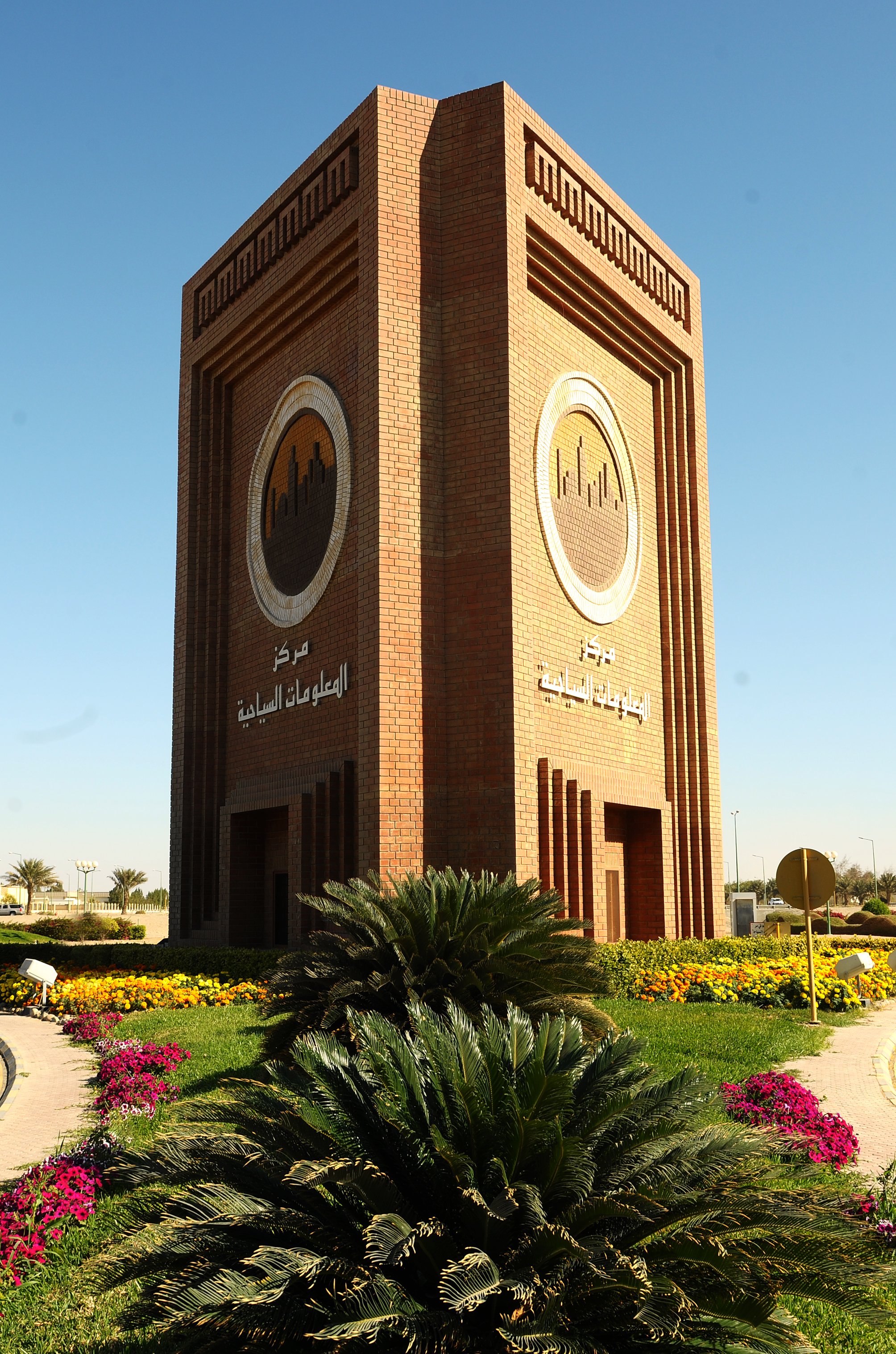 مركز المعلومات السياحية بينبع الصناعية